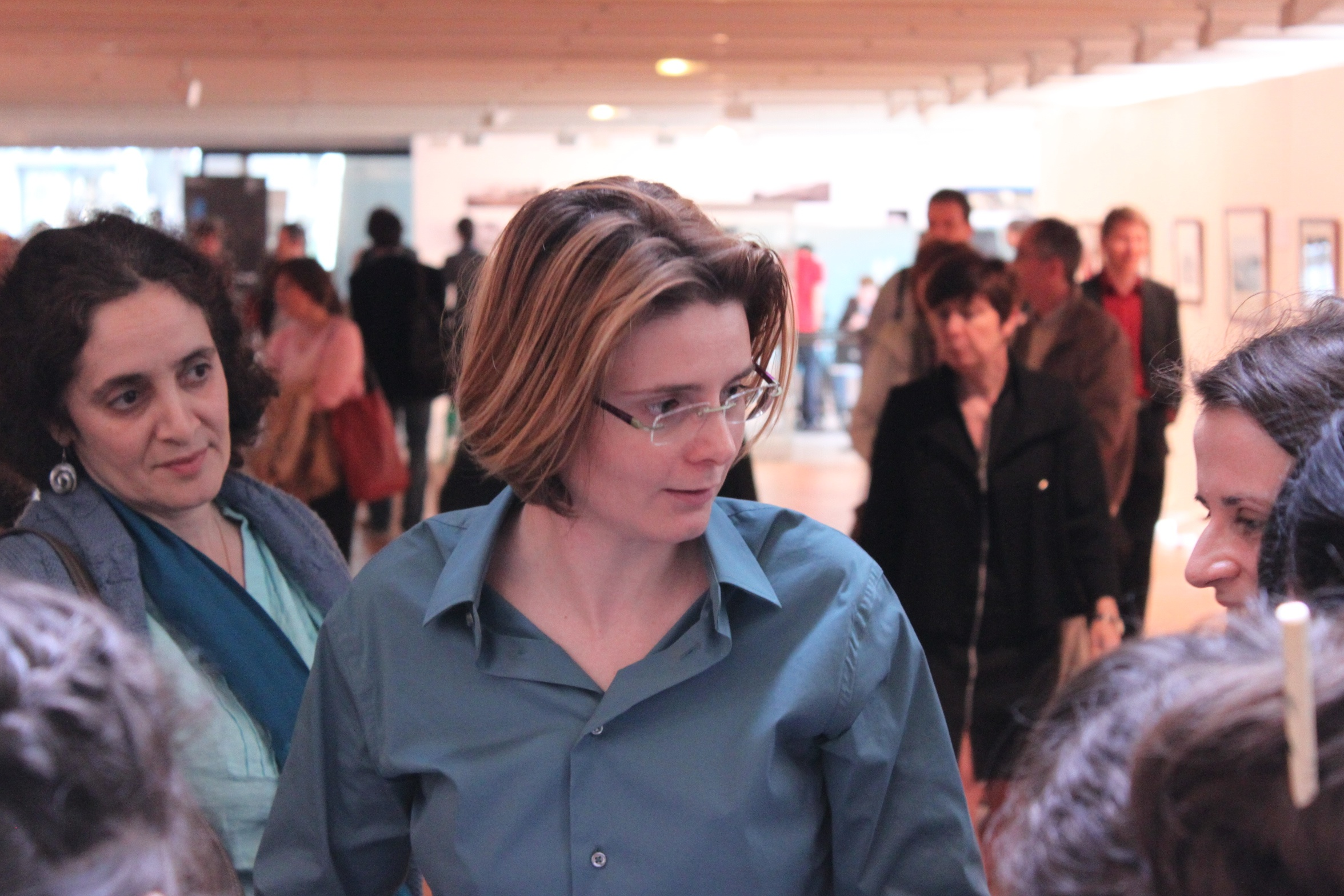 Caroline Fourest à l'Université de la Terre (UNESCO) à Paris, le 2 avril 2011.